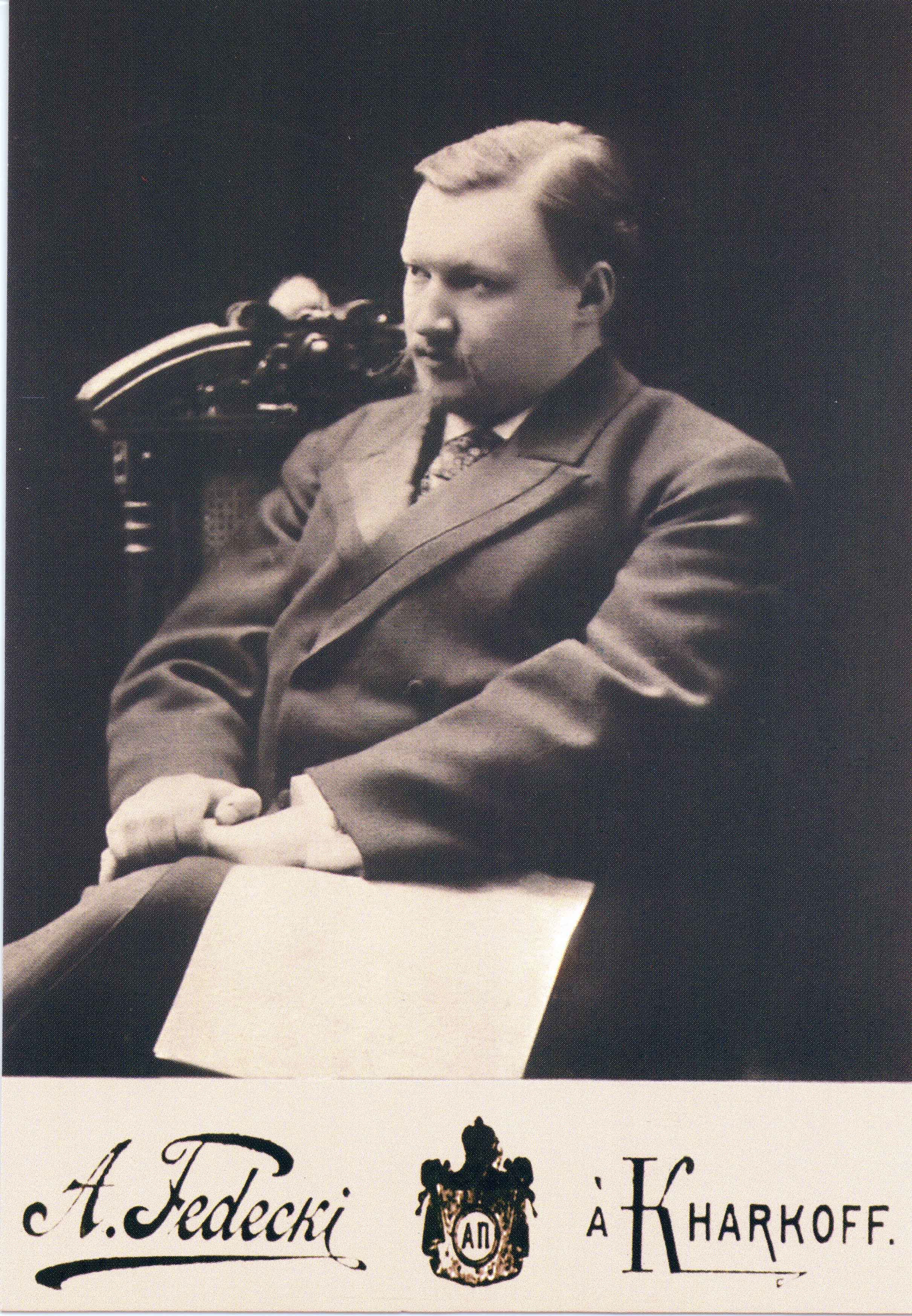 Фотограф Альфред Федецкий. Портрет русского композитора и дирижёра Александра Константиновича Глазунова. Фотография. Харьков.